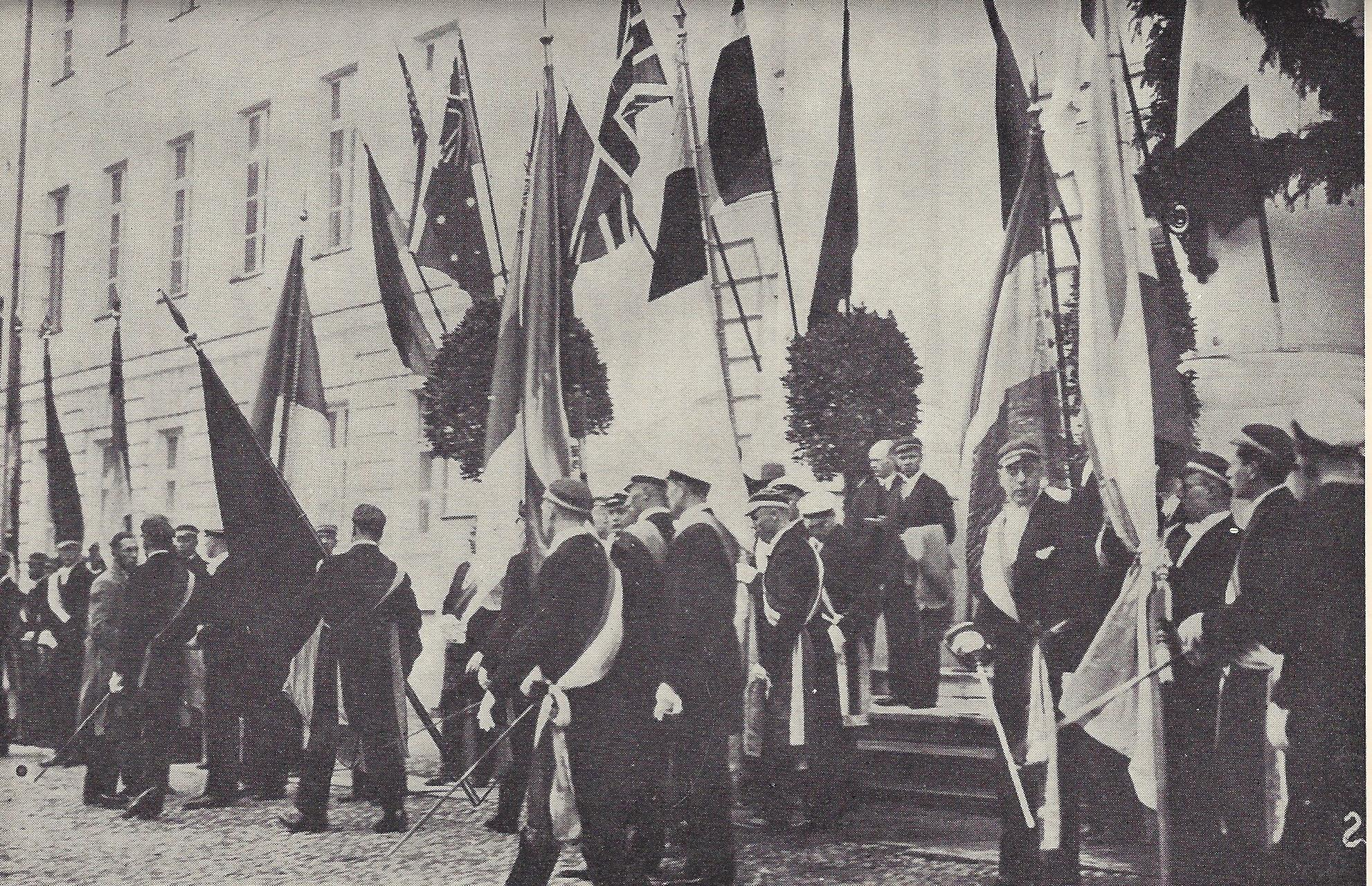 Dreihundertjahrfeier der Universität Dorpat. Die Chargierten aller Korporationen vor der Begrüßung der Ehrengäste aus der ganzen Welt, darunter der schwedische Kronprinz Gustav Adolf